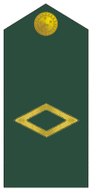 Patente